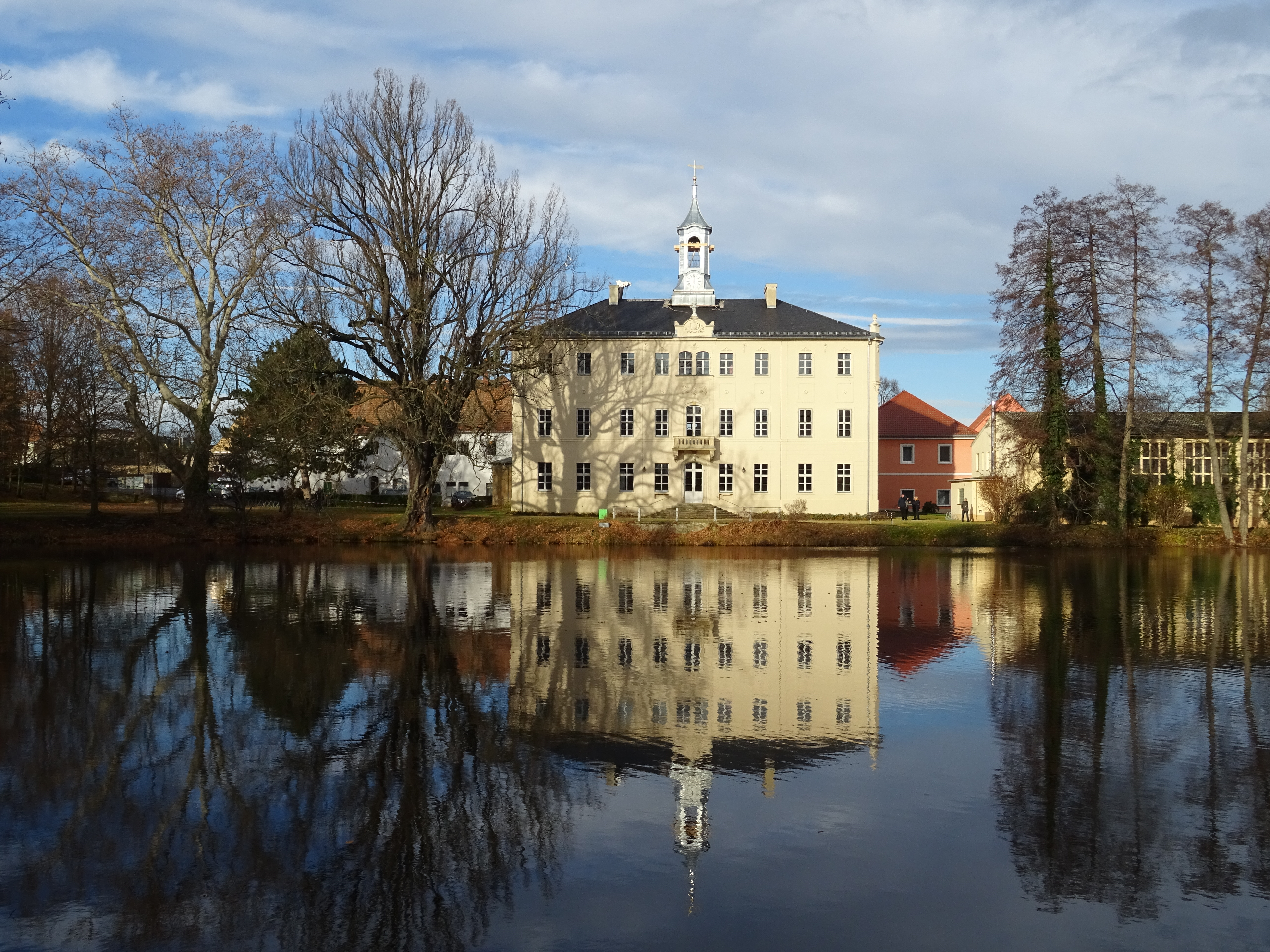 Schloss Lauterbach im Landkreis Meißen, Montage des Dachreiters.